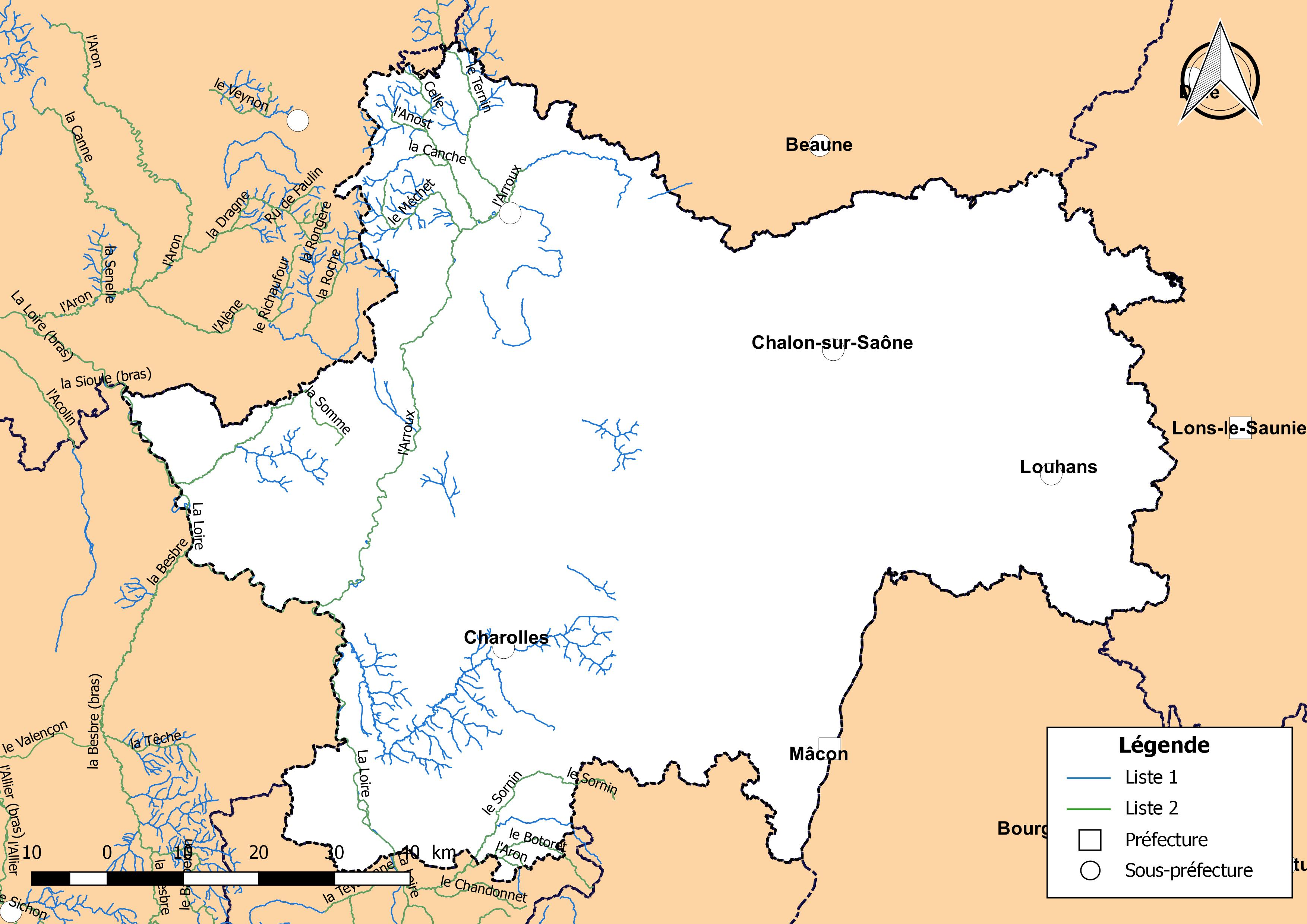 Classement des cours d'eau du département de la Saône-et-Loire (France) au titre de la continuité écologique (article L214.17 I du Code de l'environnement).